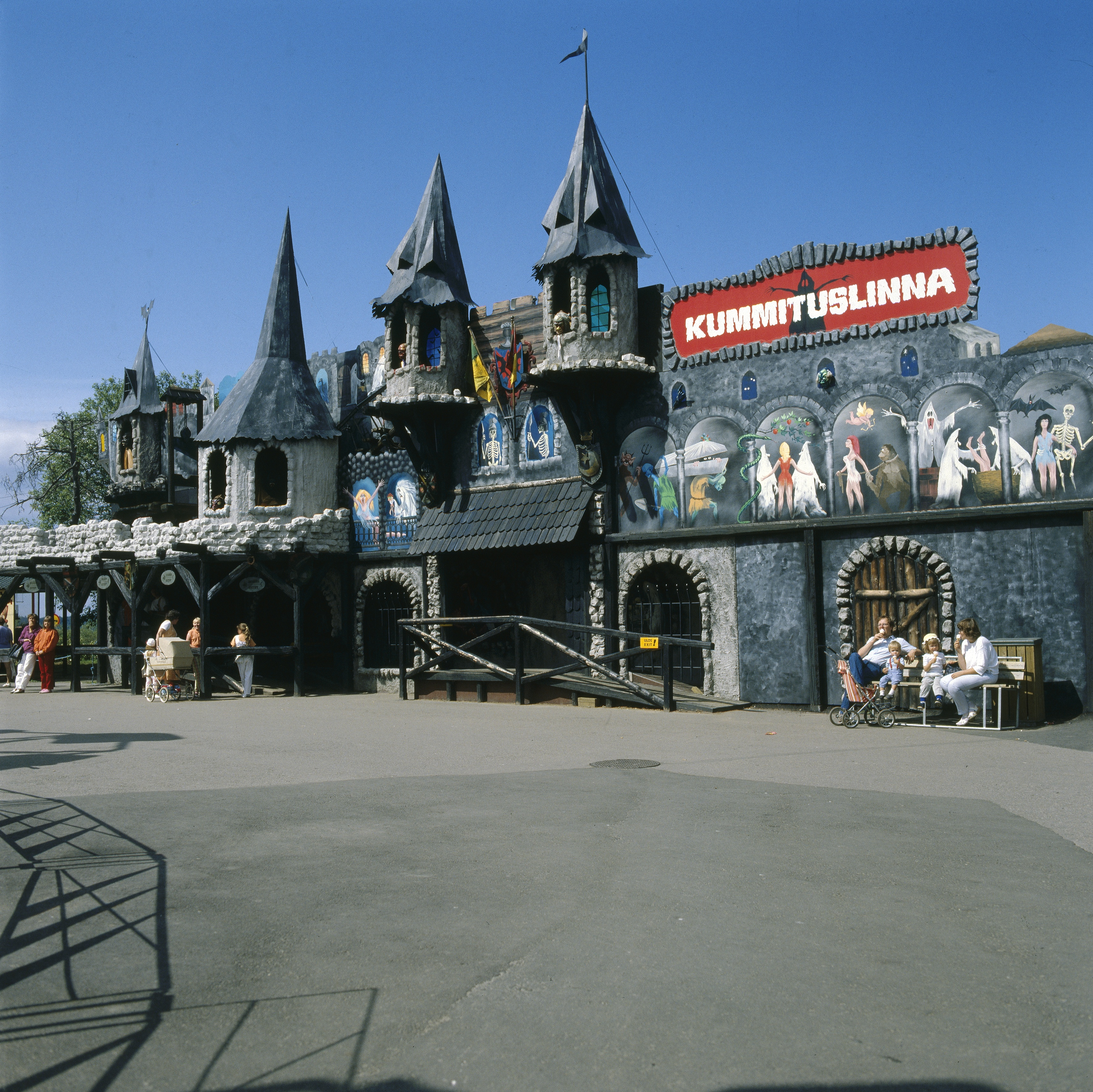 ”Kummituslinna”-niminen huvipuistolaite Särkänniemessä Tampereella